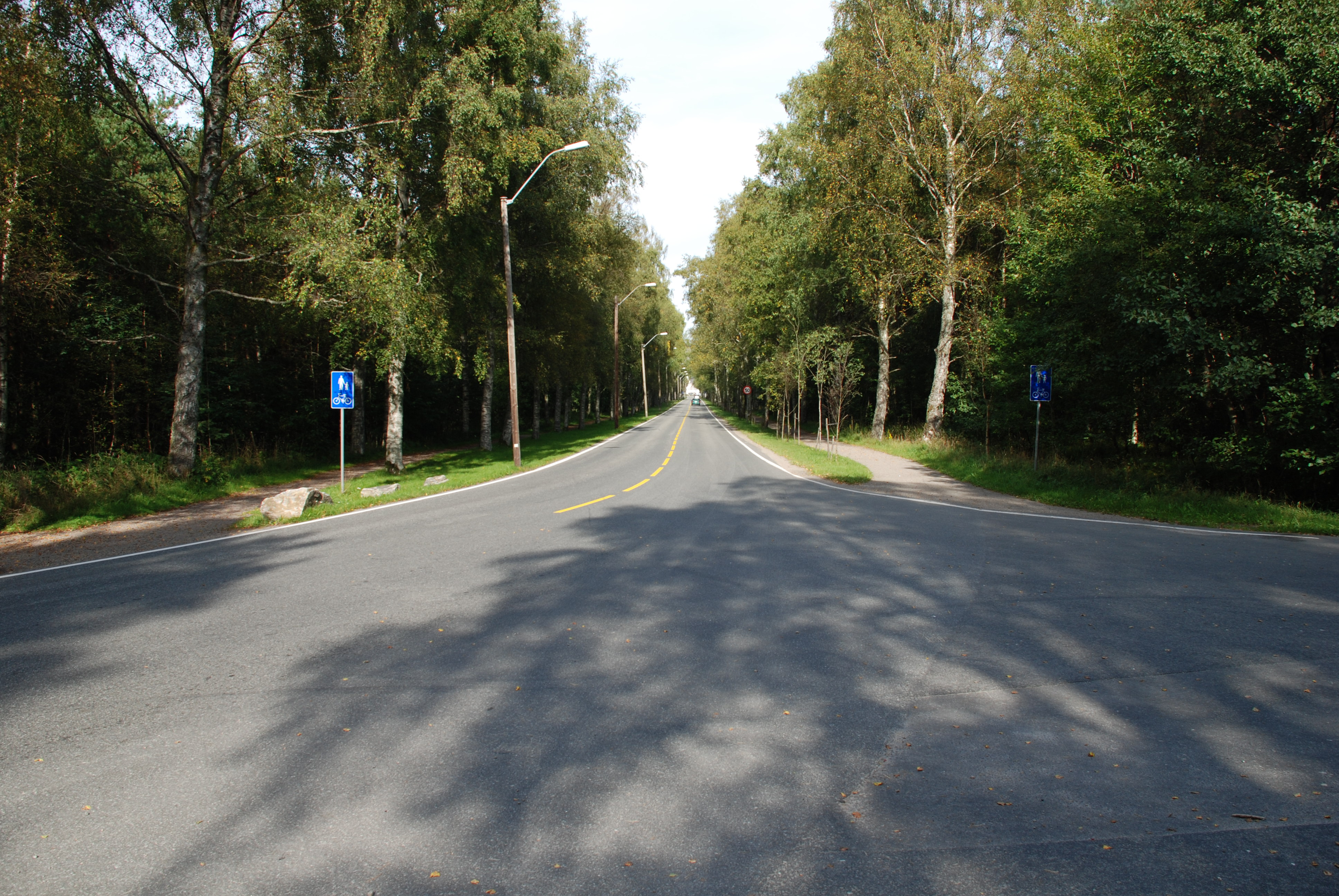 Bankeveien i Mandal. Del av Fylkesvei 202 (Vest-Agder). Veien går igjennom Furulunden, og til høyre er adkomst til Sjøsanden